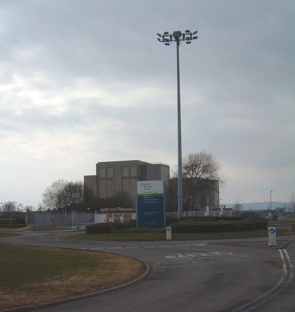 Berkeley Power Station